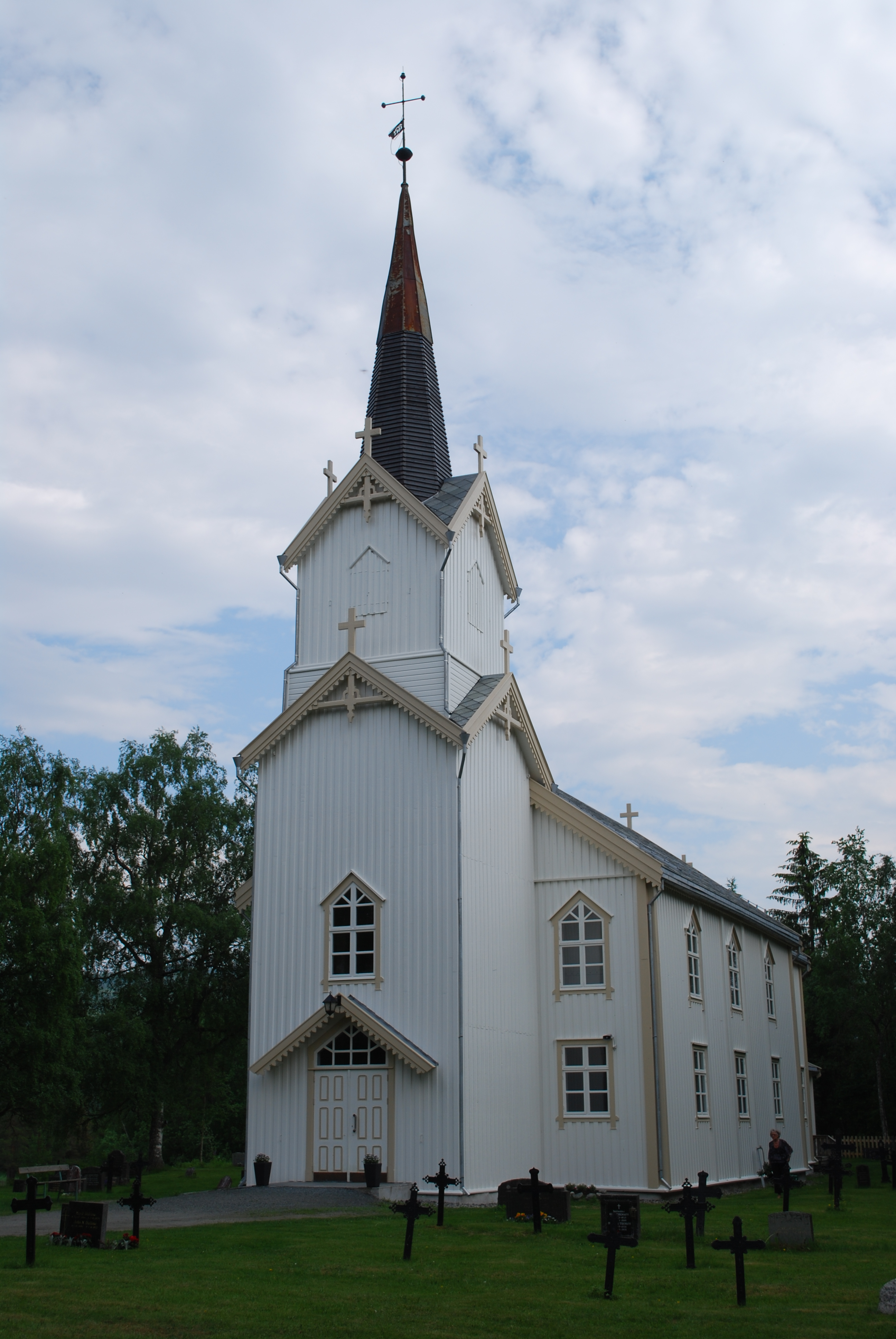 Meråker kirke i Nord-Trøndelag.